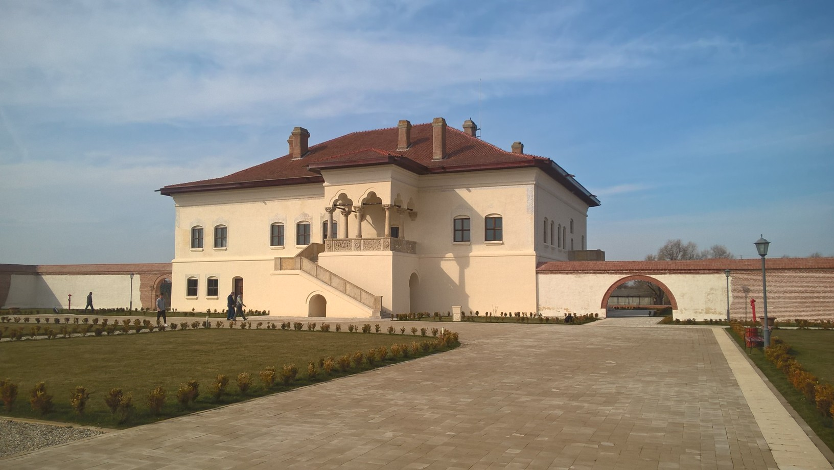 Restaurare - Conacul Potlogi.